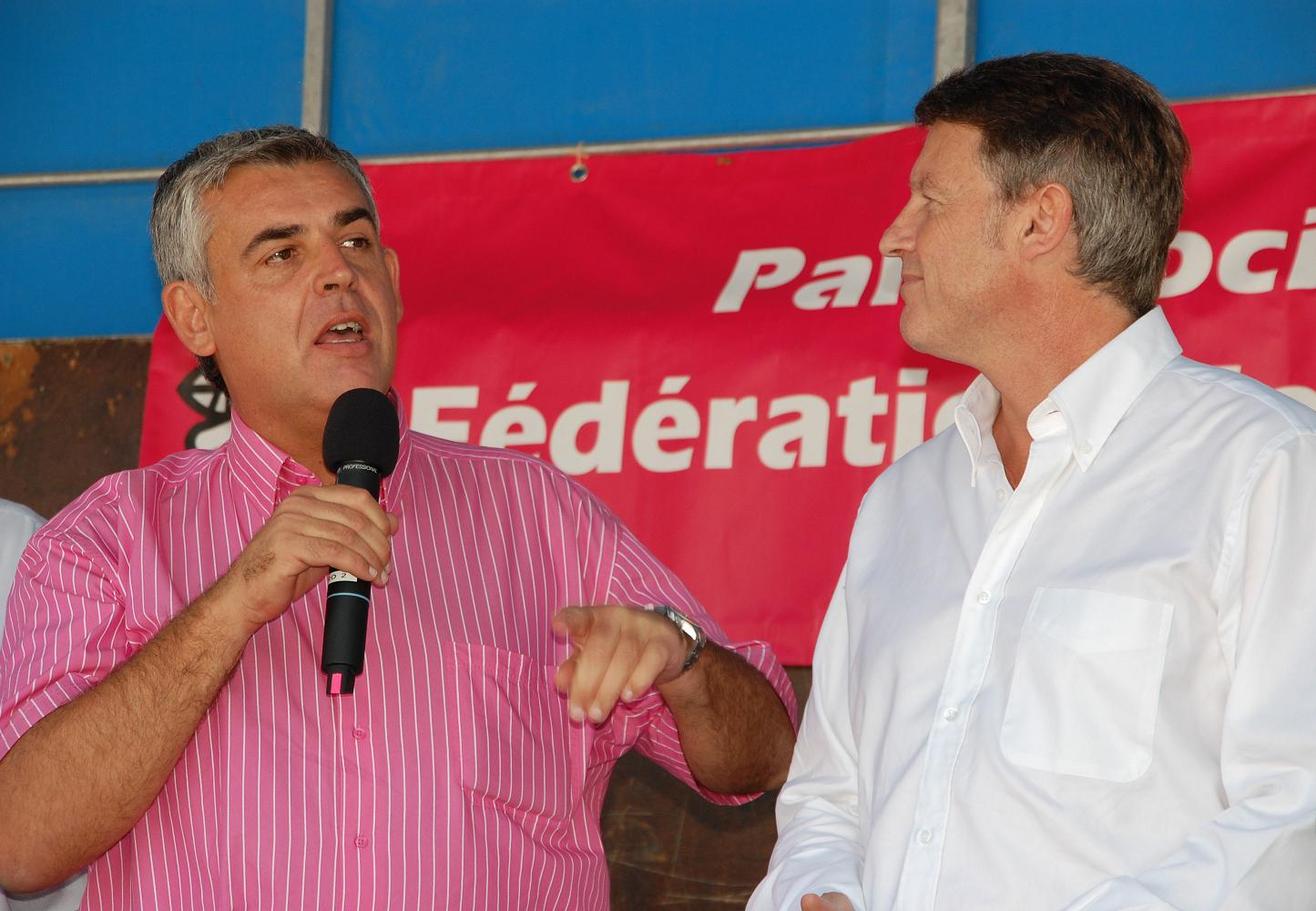 Pascal Terrase et Vincent Peillon, en septembre 2009.